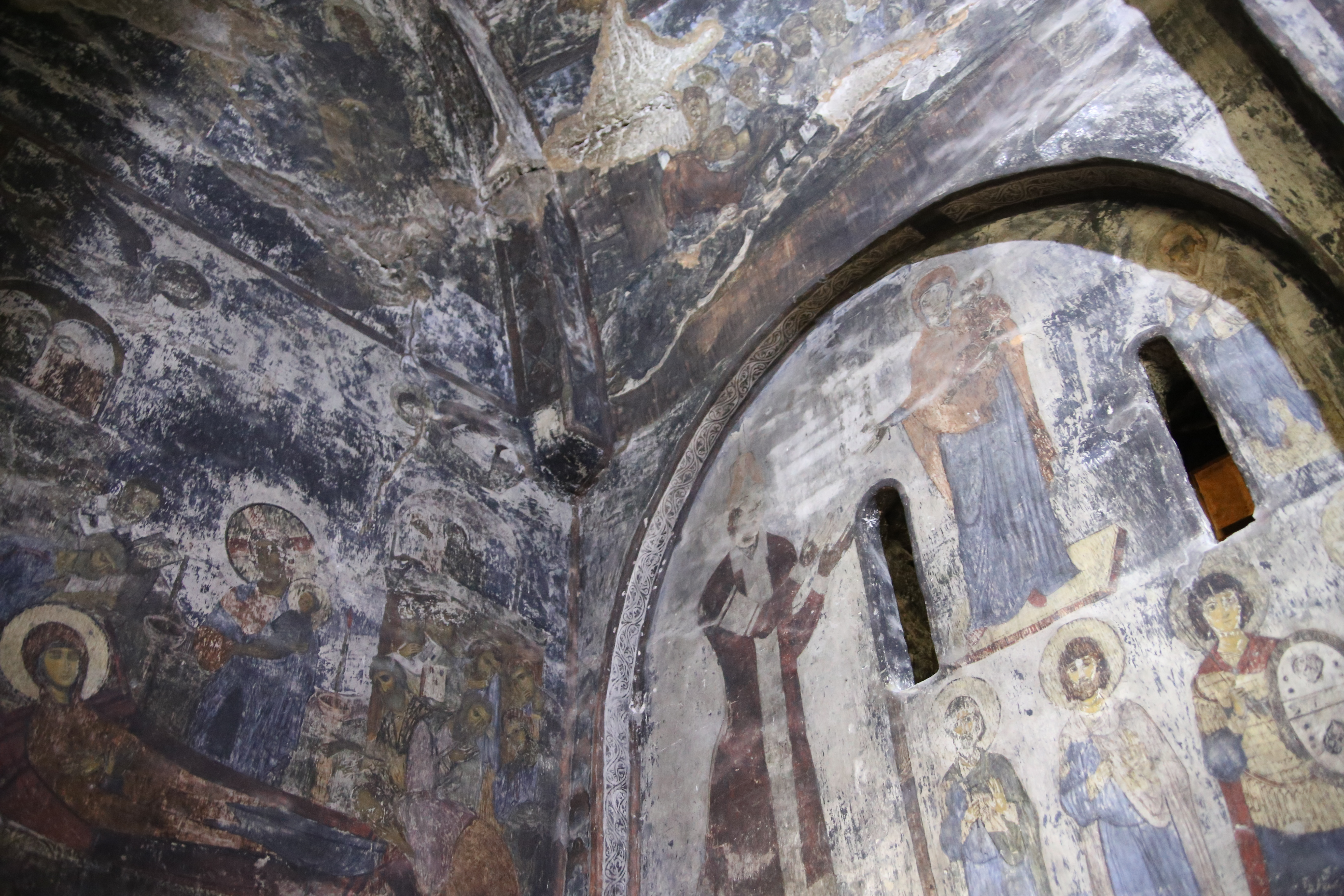 La città rupestre di Vardzia in Georgia, 2014.